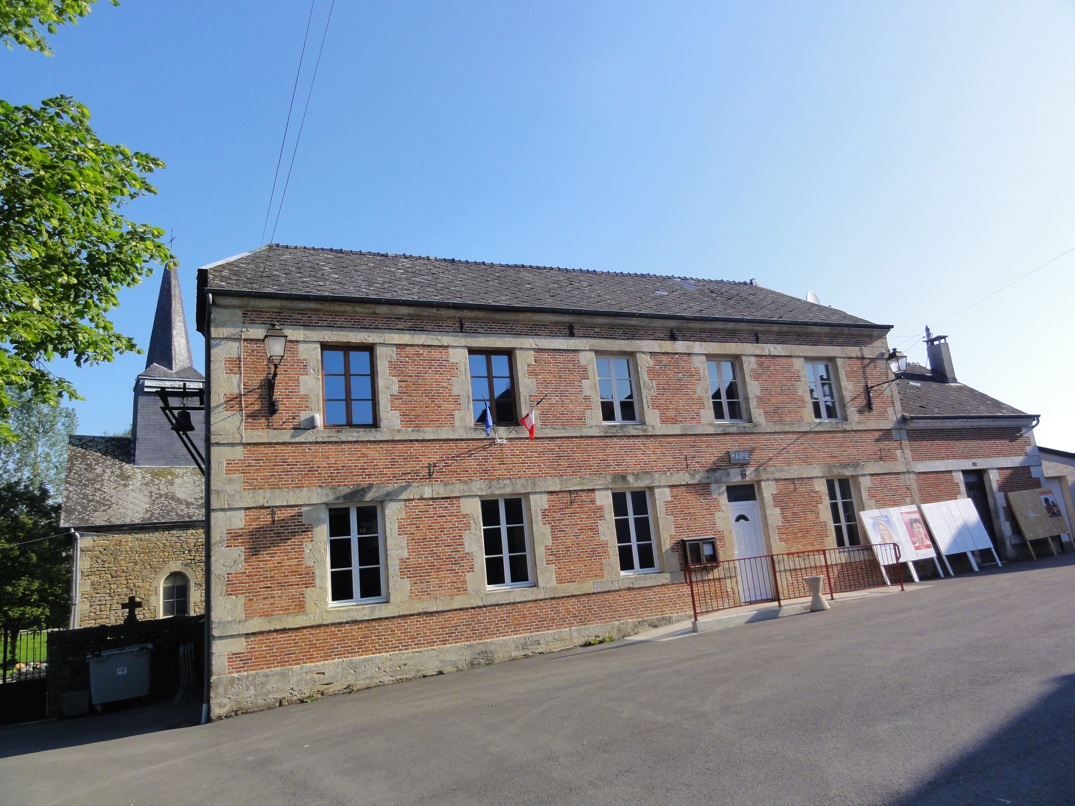 Girondelle (Ardennes) Mairie